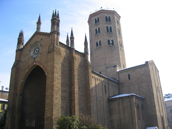 La basilica di Sant'Antonino a Piacenza.